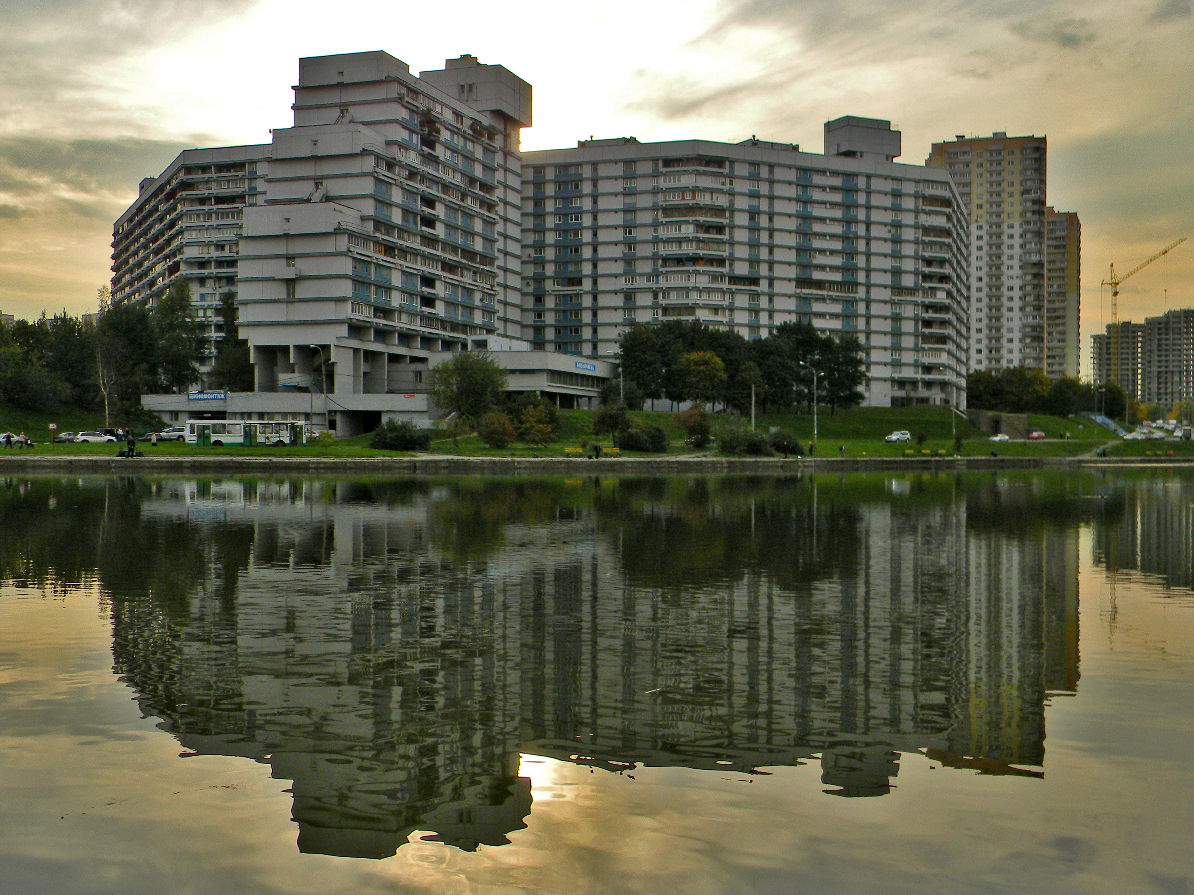 Москва, Образцово-перспективный жилой район, комплекс 2. Северо-восточный фасад.